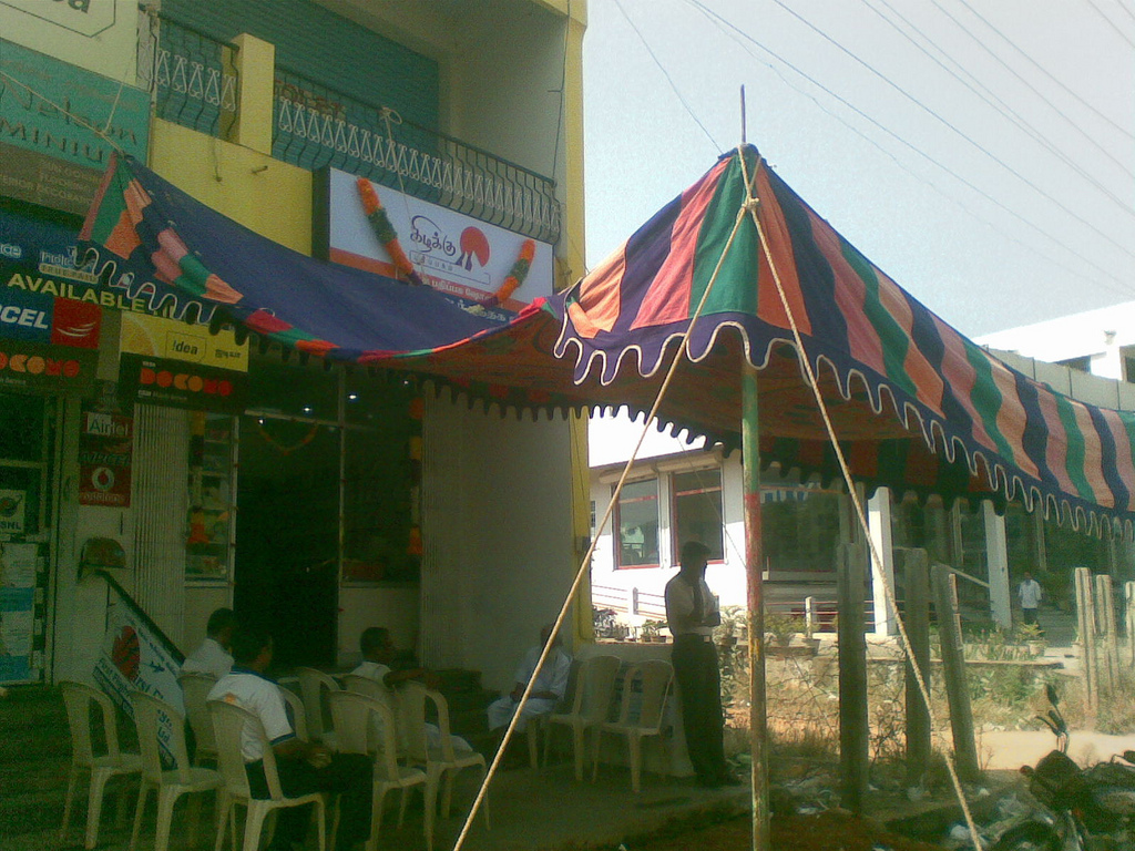 Nagarcoil Kizhakku showroom